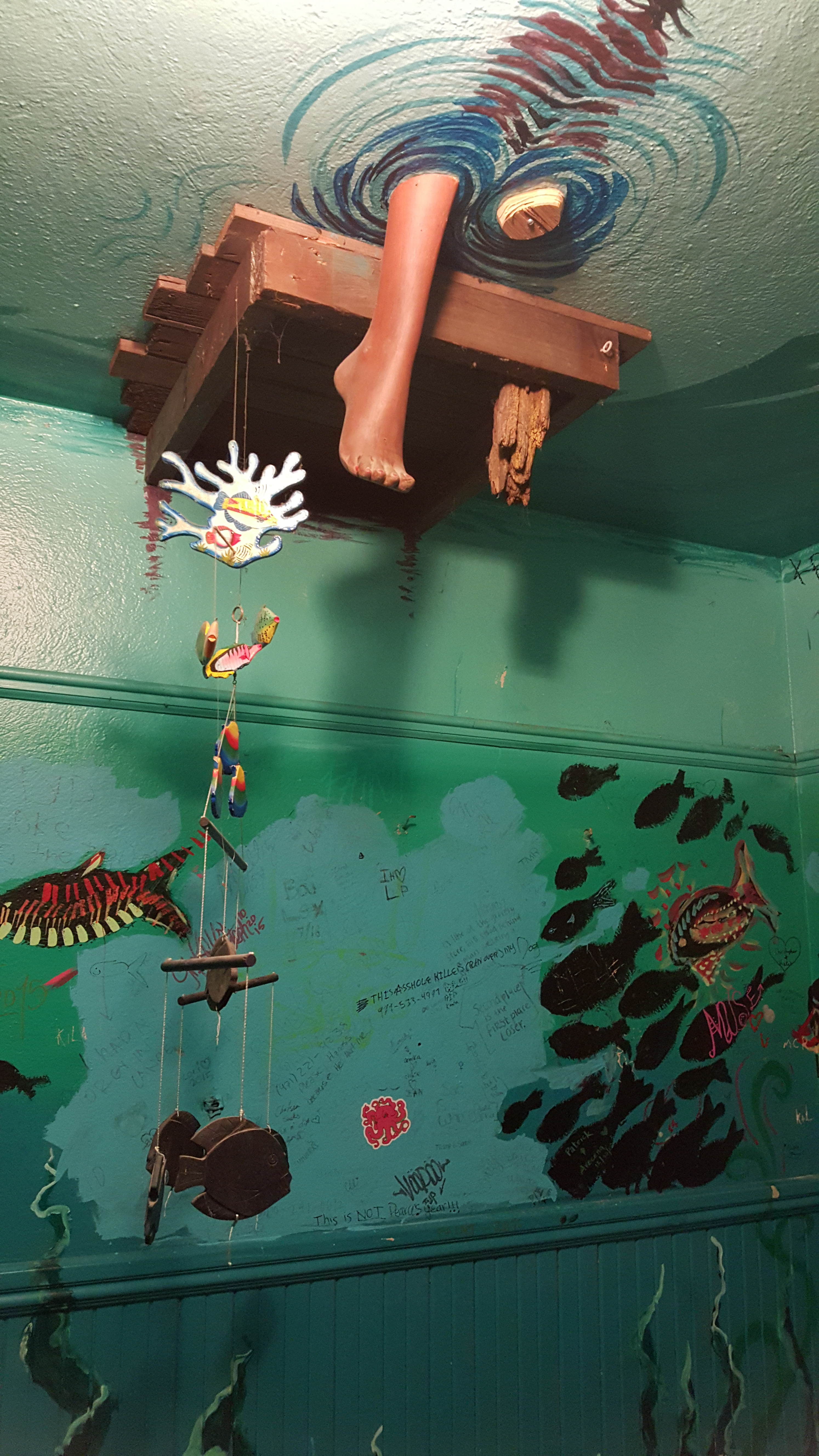 Rimsky-Korsakoffee House